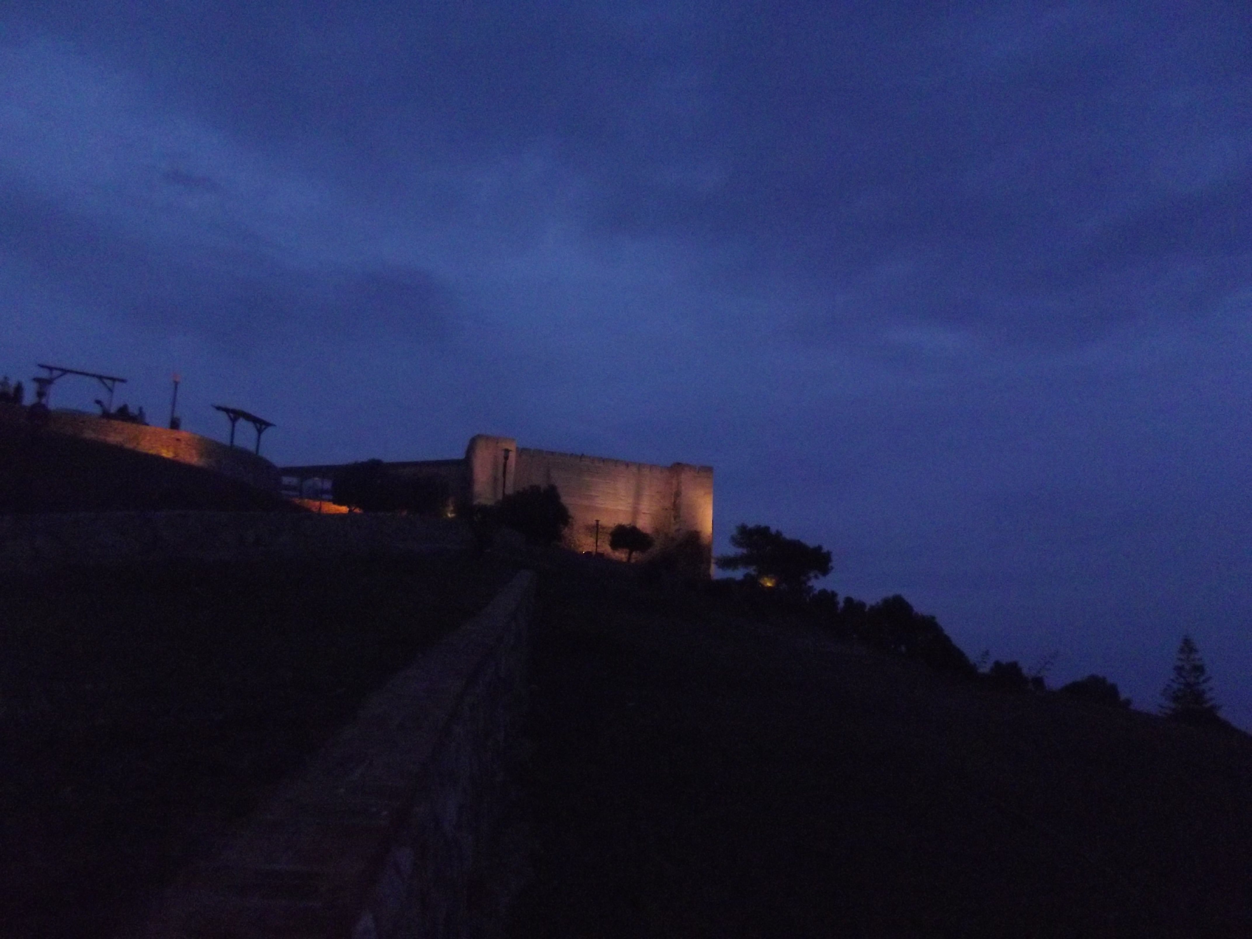 El Castillo Sohail visto por la noche desde el Parque del Castillo